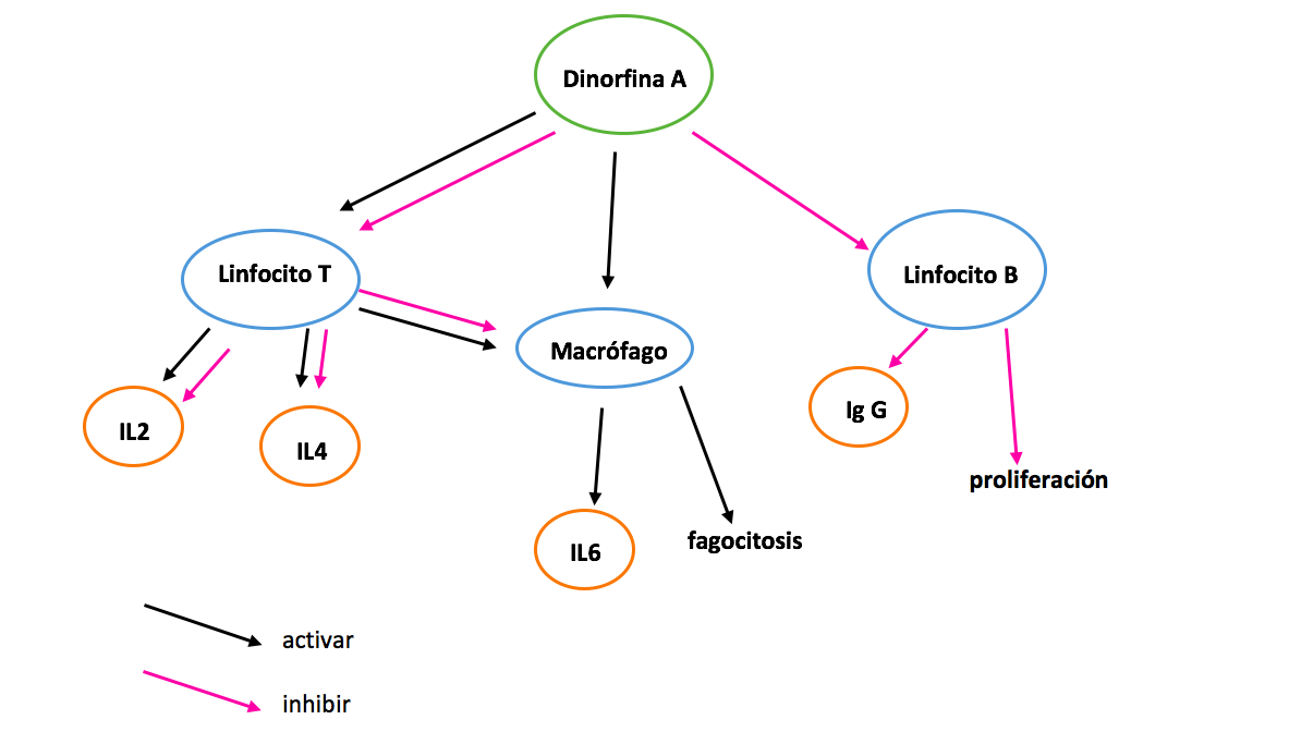 dinorfinas